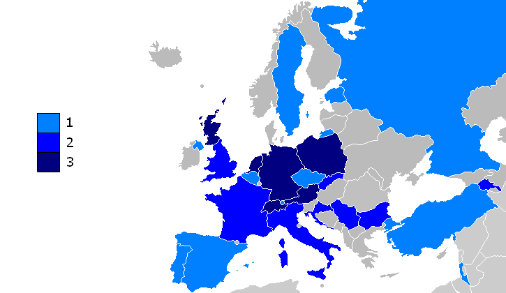 Зустрічі ФК Дніпро у європейських змаганнях